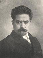 Fotografía del escritor, periodista, docente y diplomático uruguayo Juan Zorrilla de San Martín (1855 - 1931).